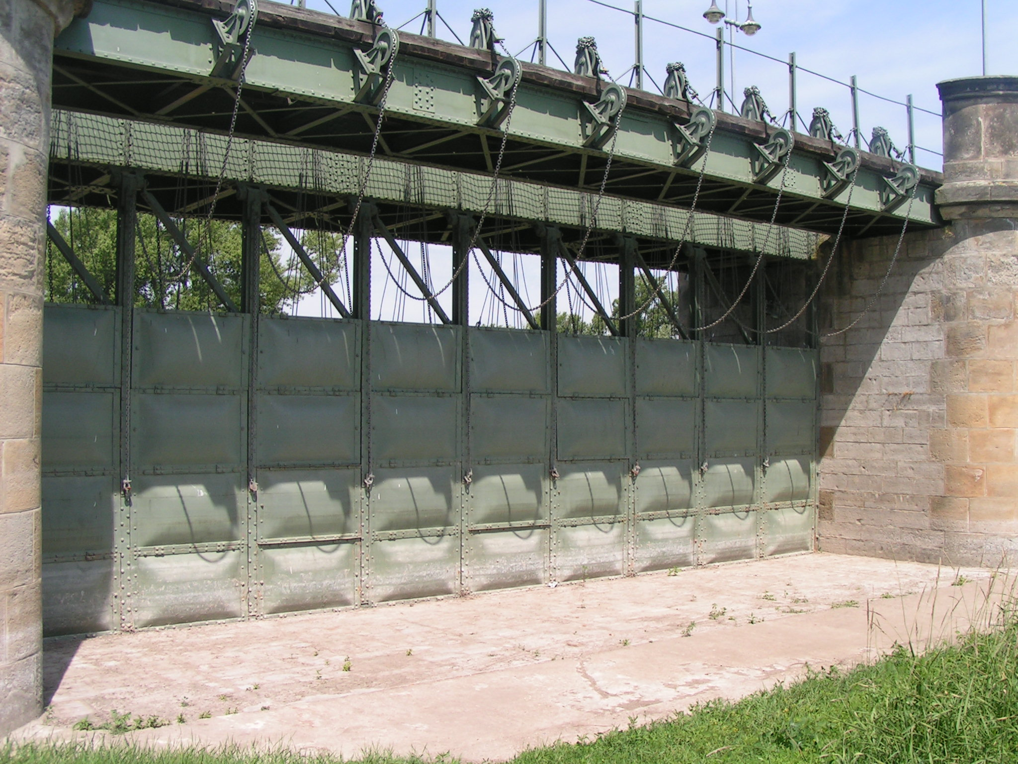 Pretziener Wehr - Detailfoto